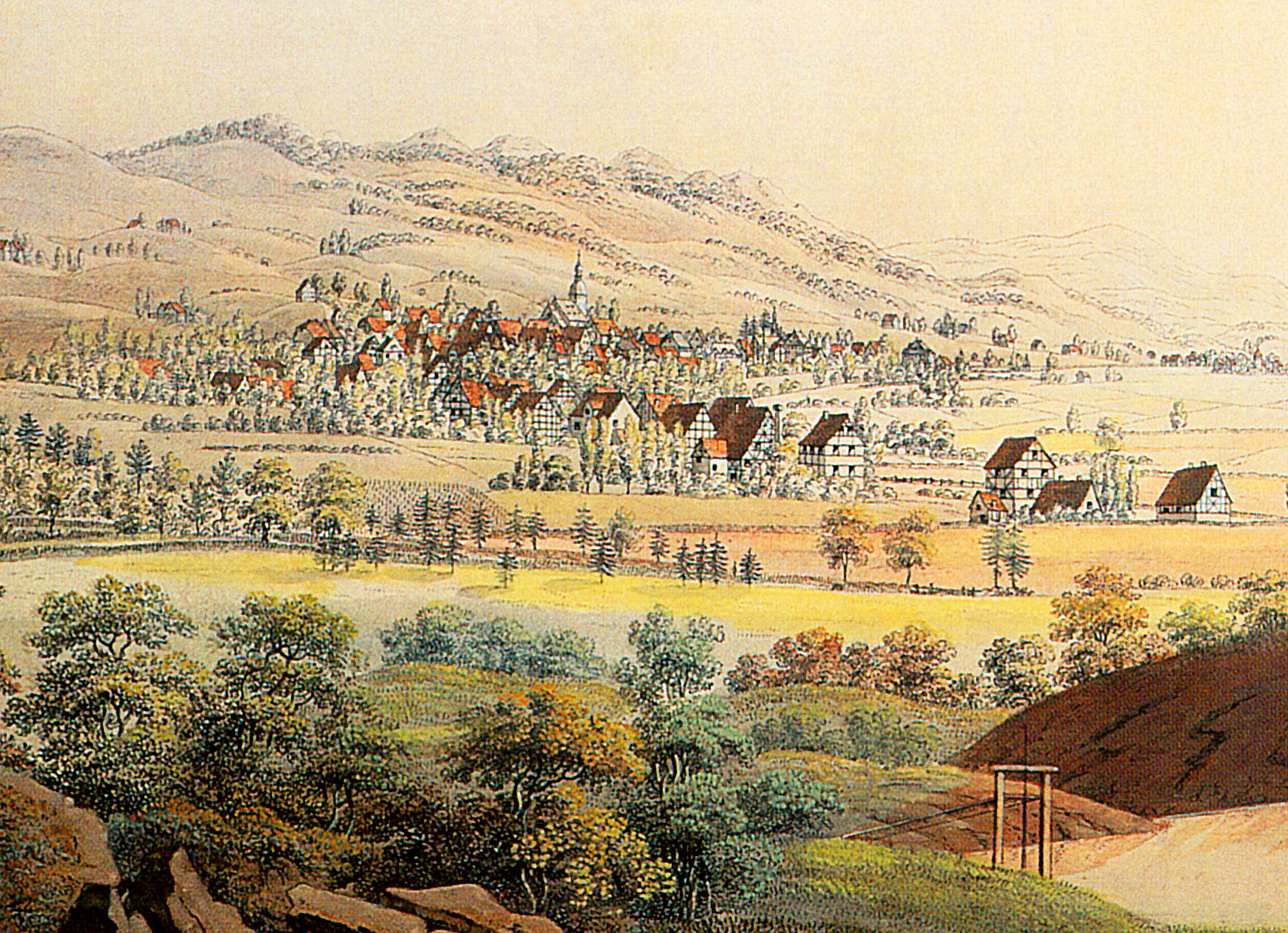 Ansicht der Stadt Schwelm, kolorierte Umrissradierung. Ausschnitt. (Original im Museum Haus Martfeld, Schwelm). Mittig vorgelagert zu erkennen ist das Dorf Möllenkotten.